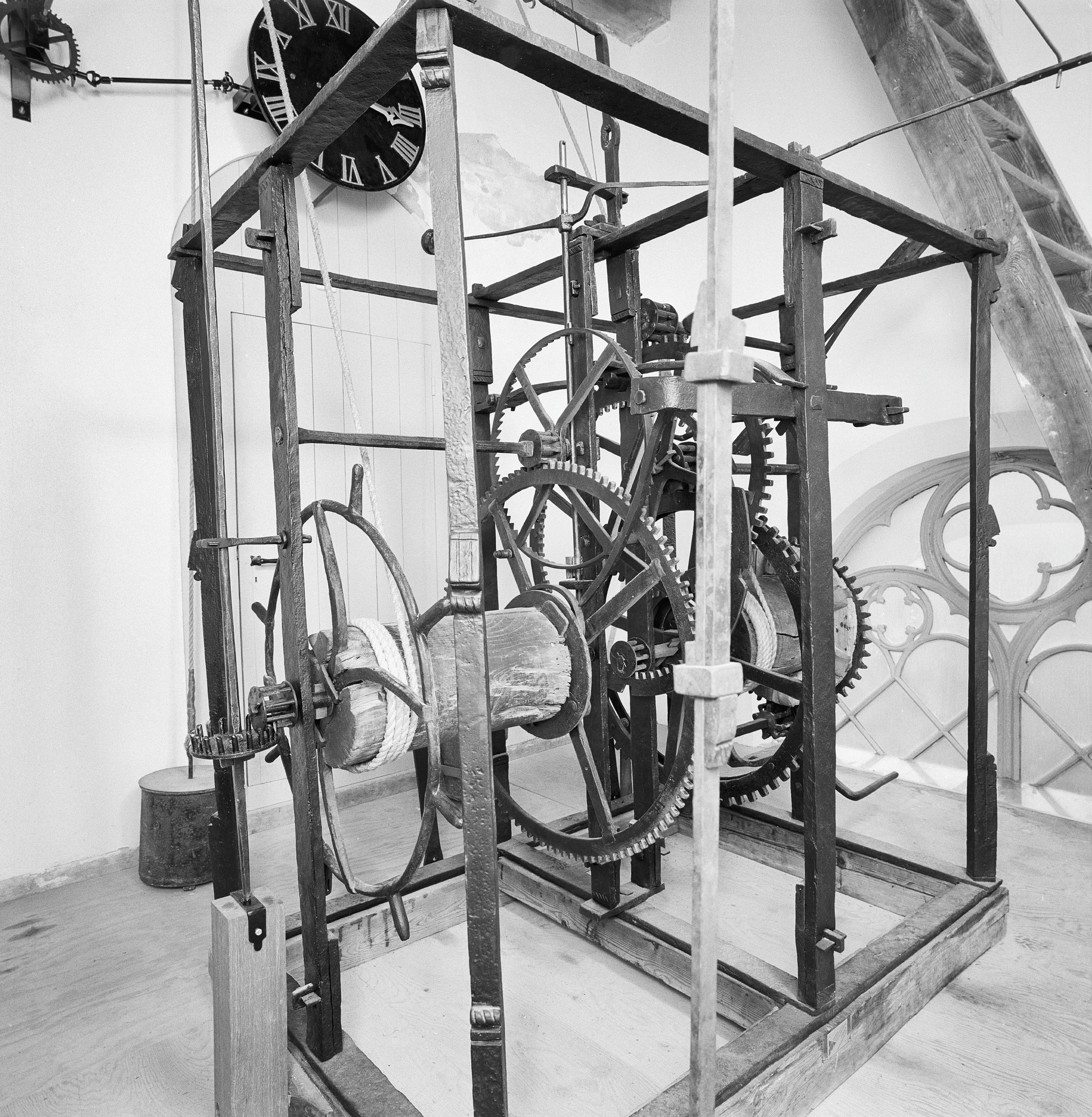 Nederlands Hervormde Kerk: Interieur toren, uurwerk